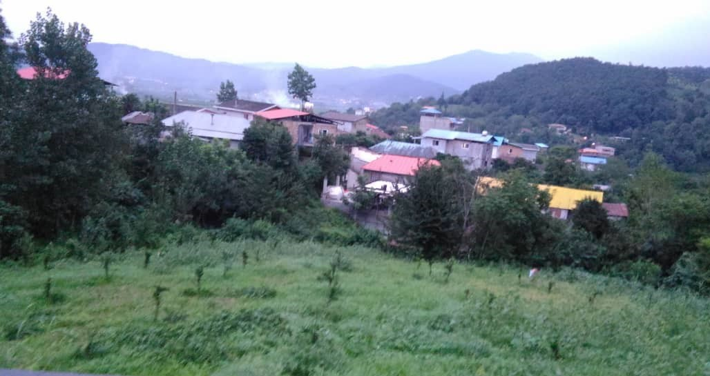 شیرگاه مرکز سواد کوه شمالی